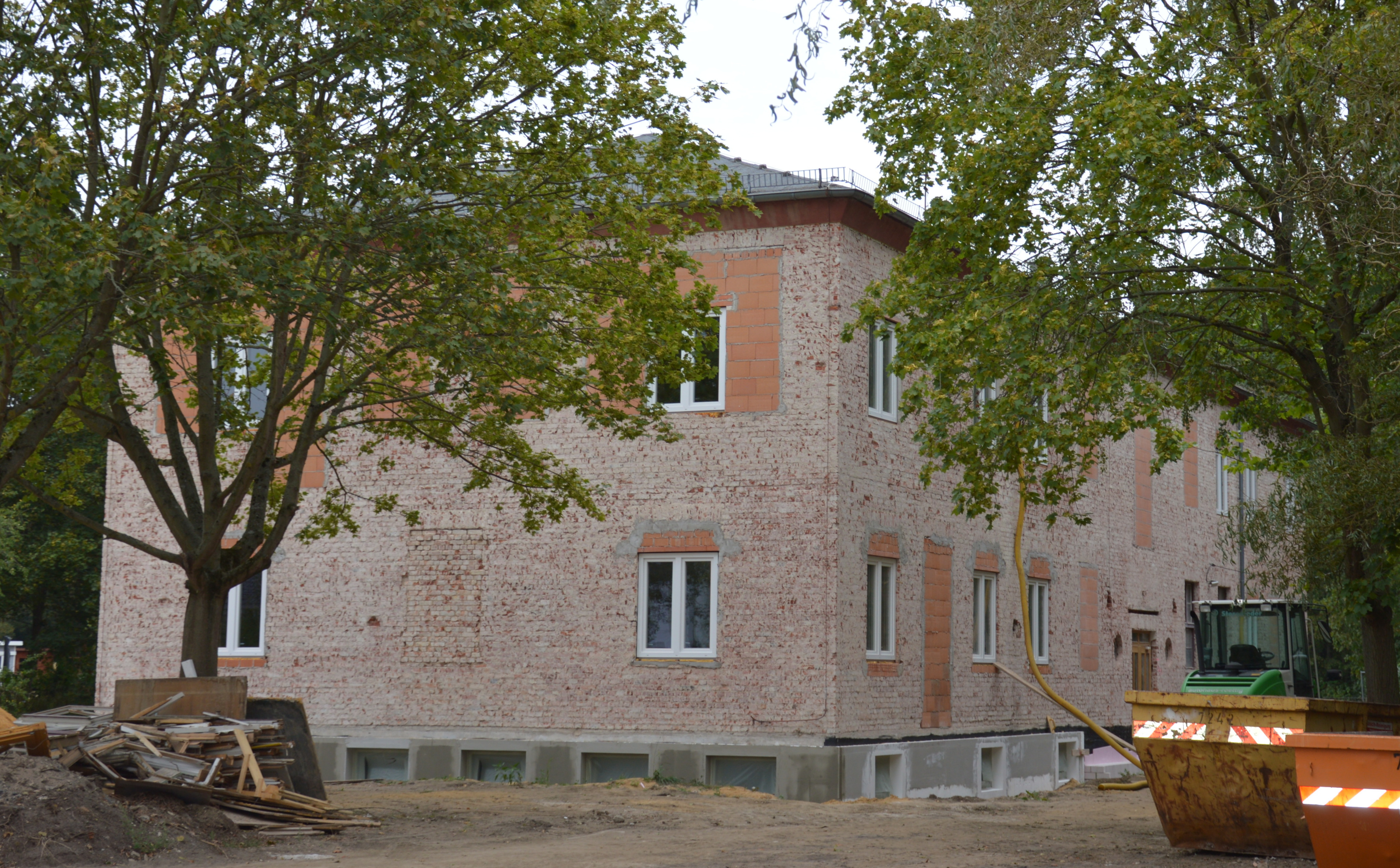 Haus Zur Muttereiche 2 in Magdeburg